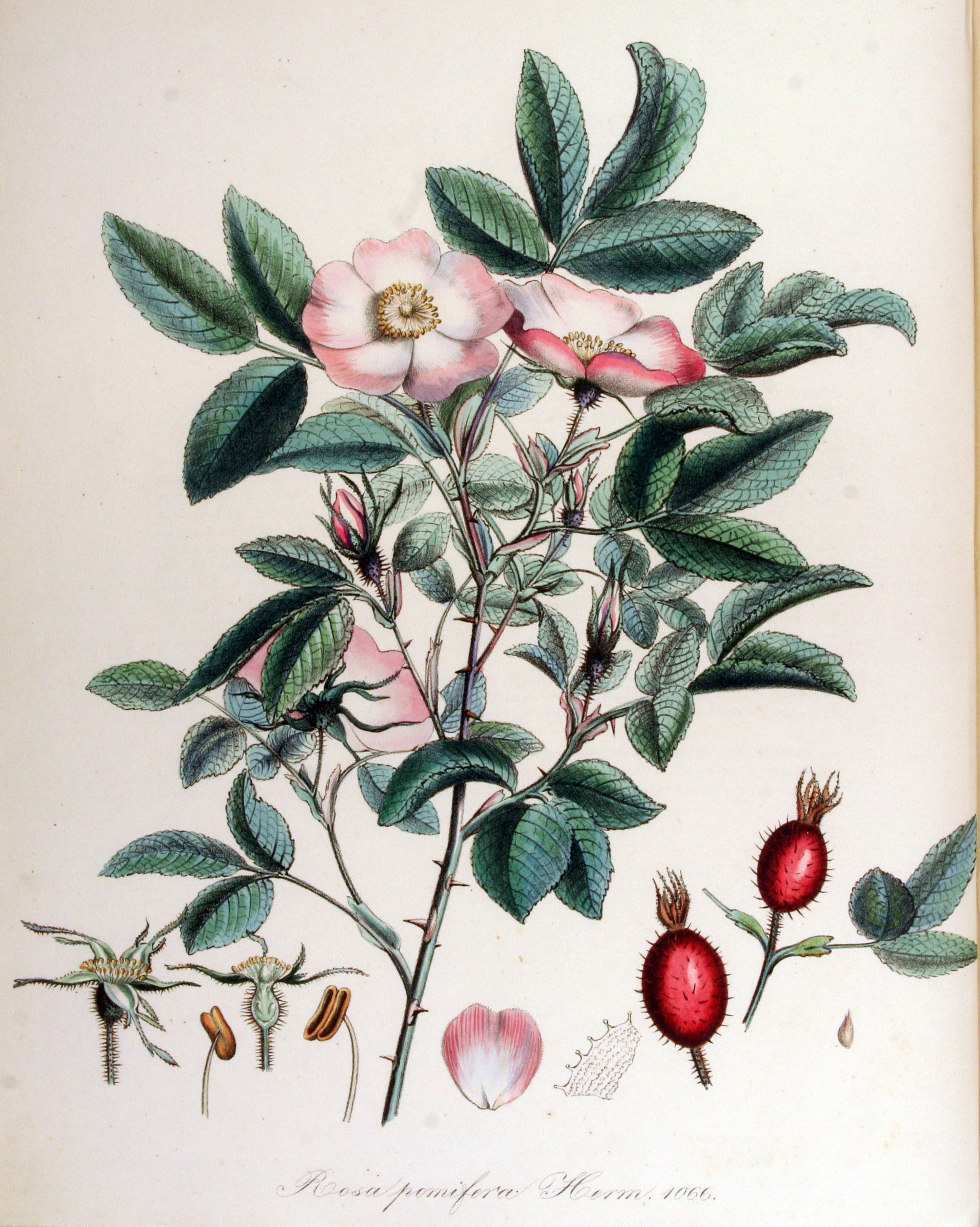 Rosa villosa L. (Syn. Rosa pomifera J. Herrmann)